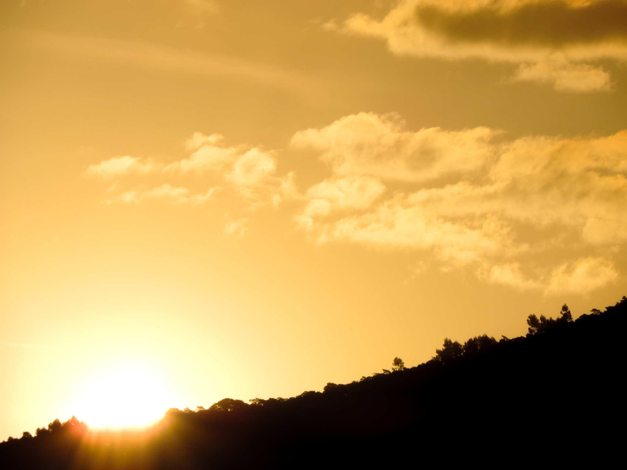 Pôr de sol com vista do Morro Ferrabráz.